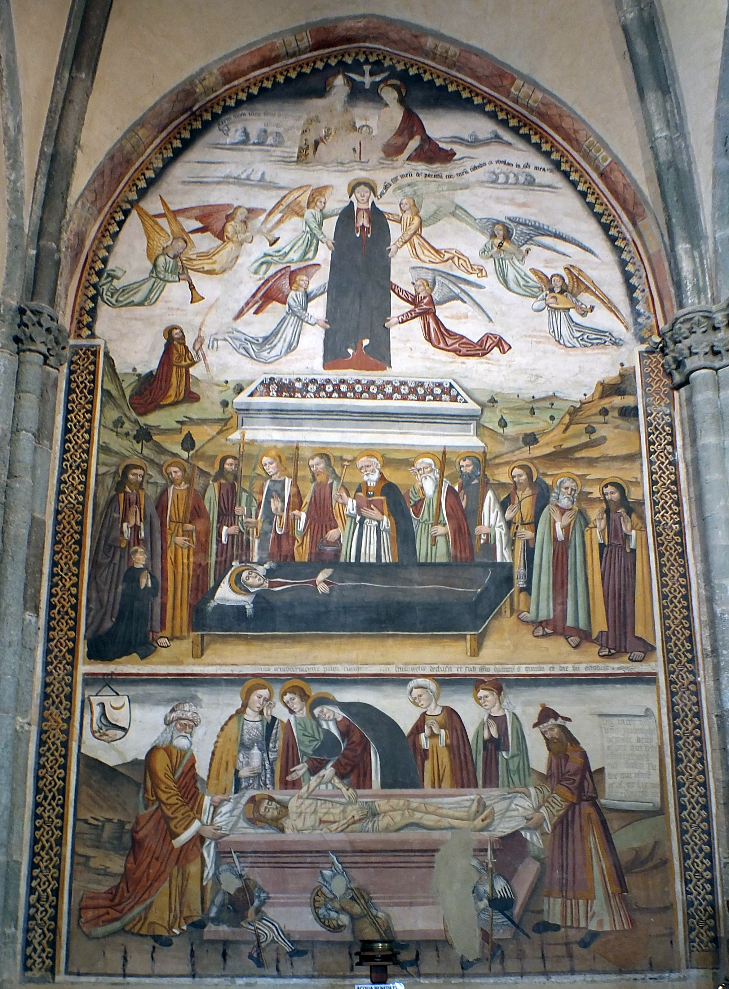 Sacra di San Michele, Affresco dell'Assunzione di Maria realizzato nel 1505 da Secondo del Bosco di Poirino all'interno della Chiesa